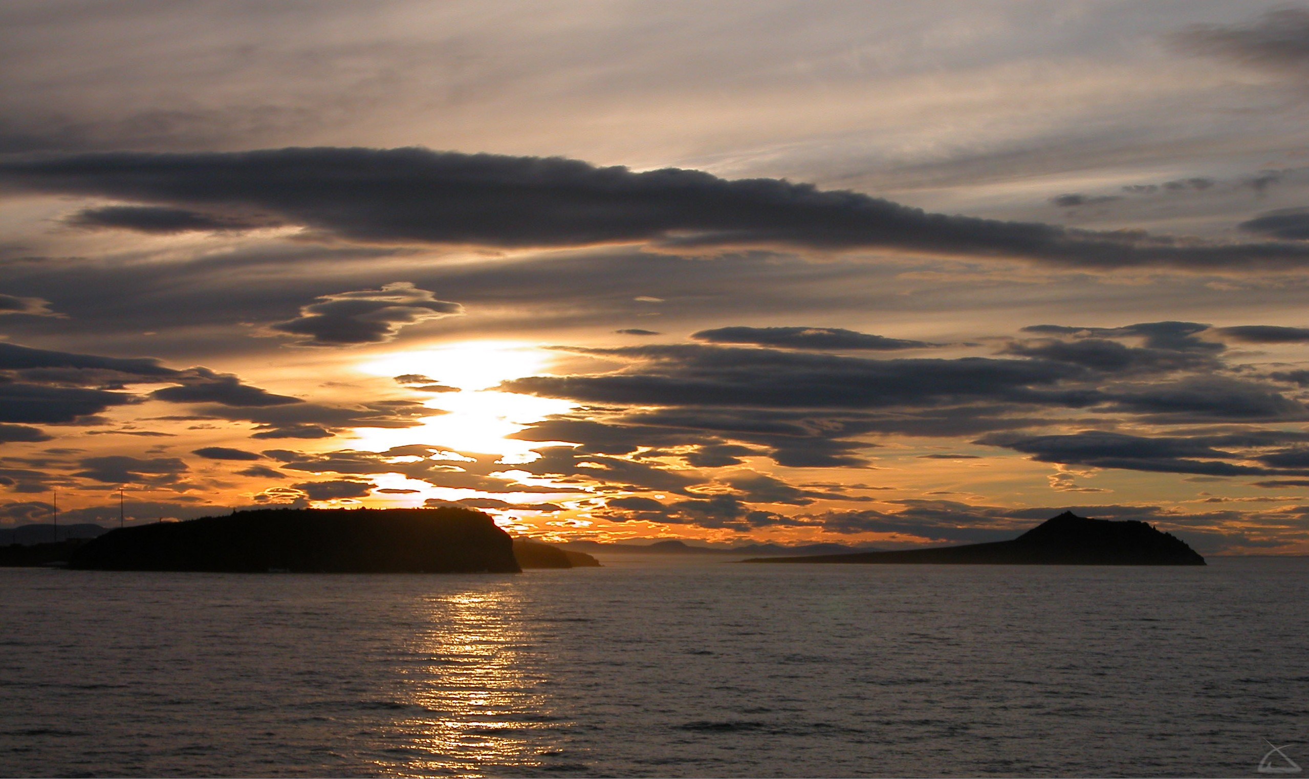 Утёсы Кожевникова и Вебер, мыс Шмидта